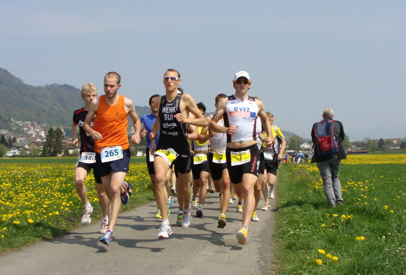 Rheintal Duathlon 2010, Spitzenfeld